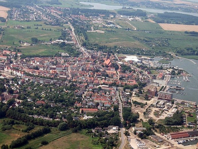 Luftbildaufnahme der Stadt Barth